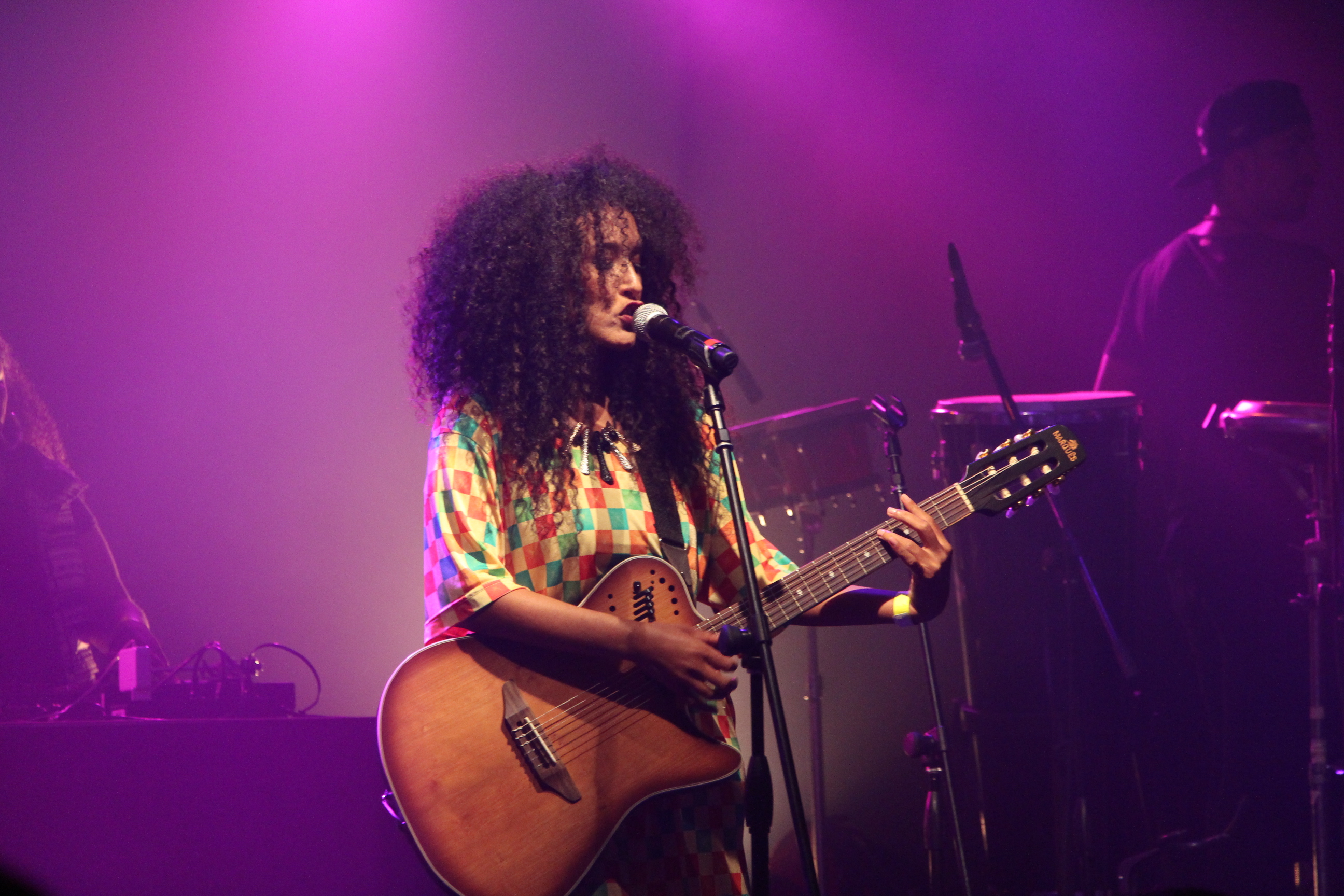 Yzalú se apresentou em um show em janeieo de 2017 no Sesc São Paulo em 2017